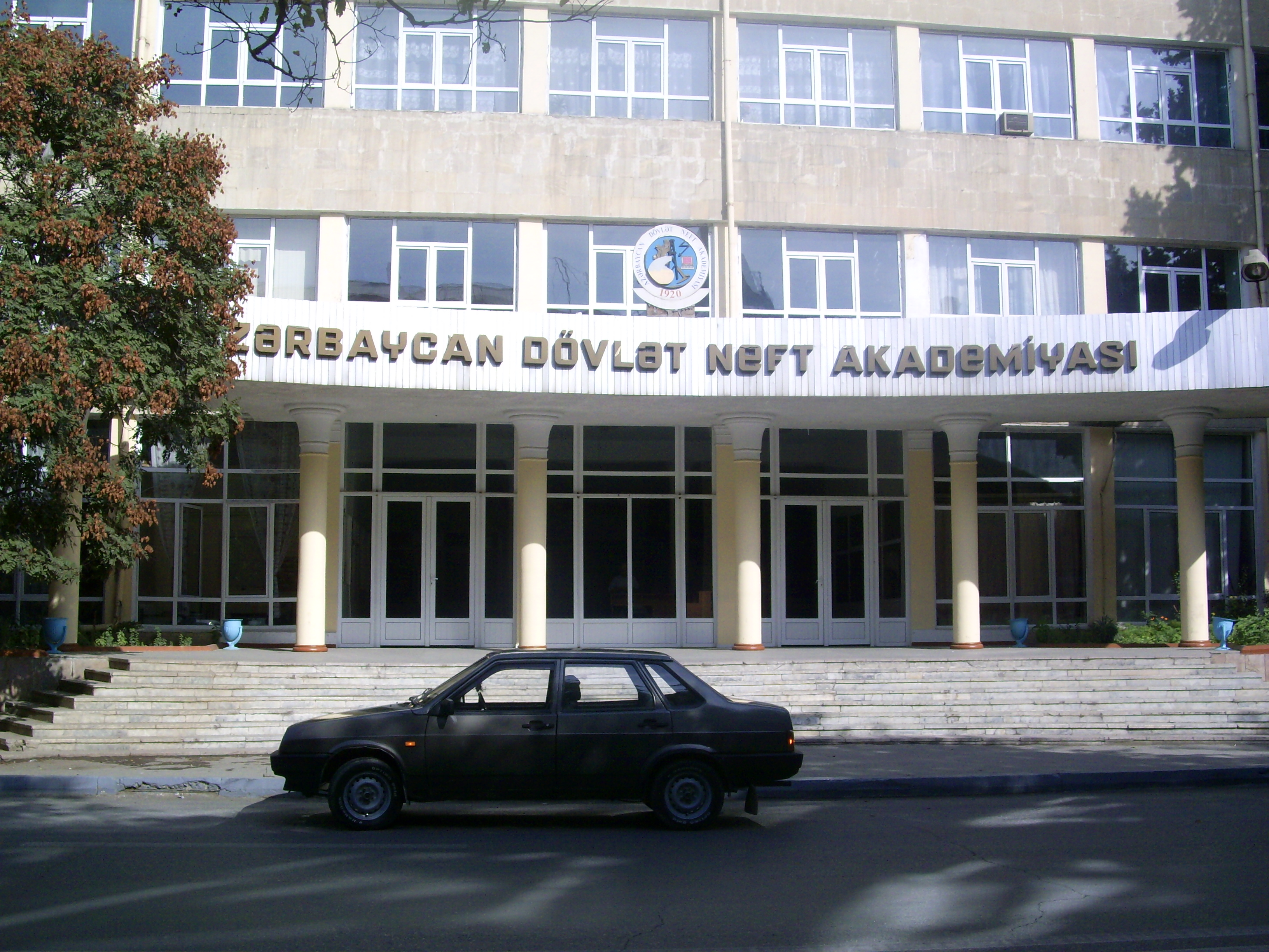 Азербайджанская Нефтяная Академия